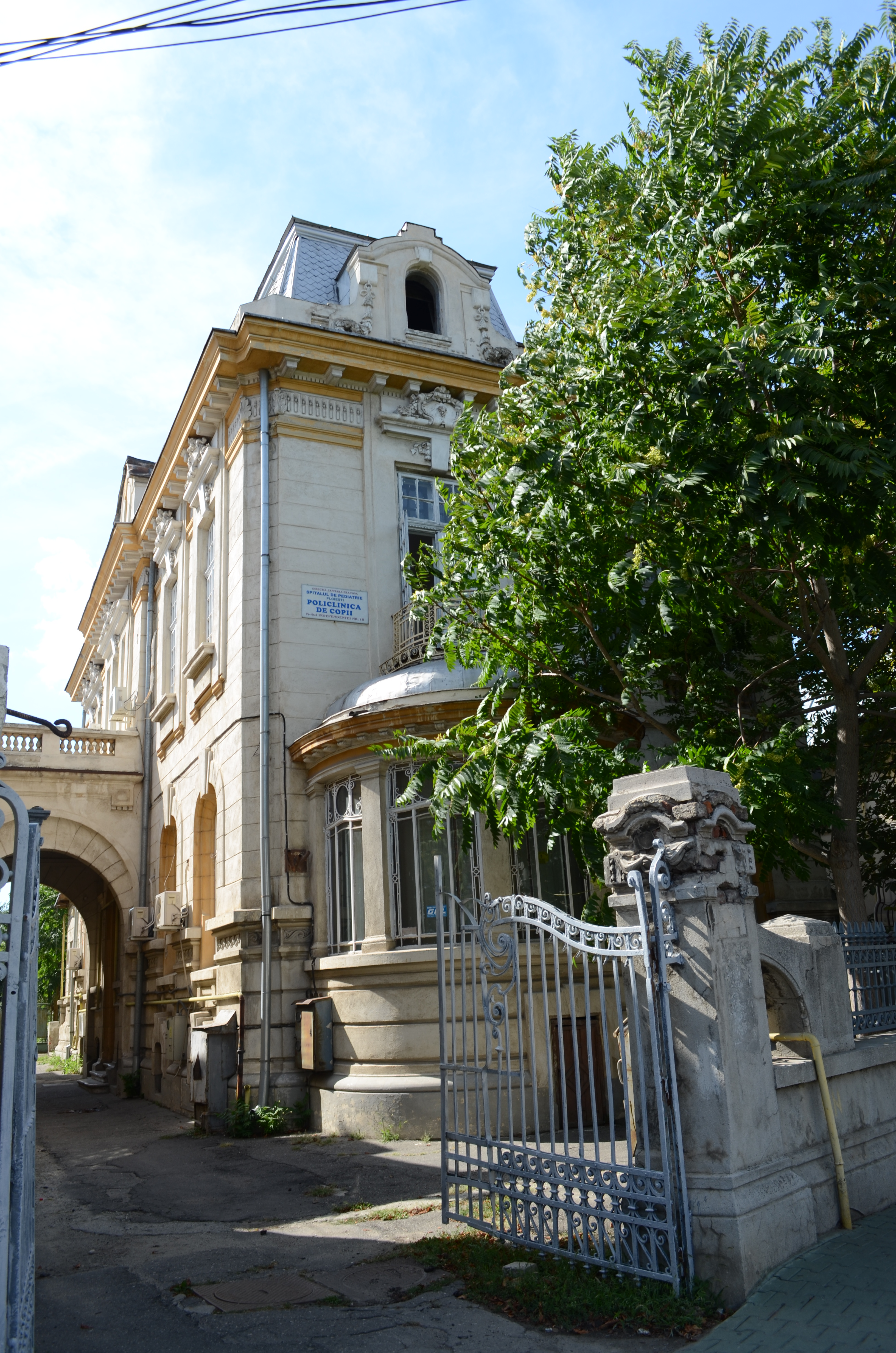 Casa Scarlat Sc. Orăscu, azi Policlinica de copii a Spitalului de Pediatrie Ploiești, Bd. Independenței nr. 18